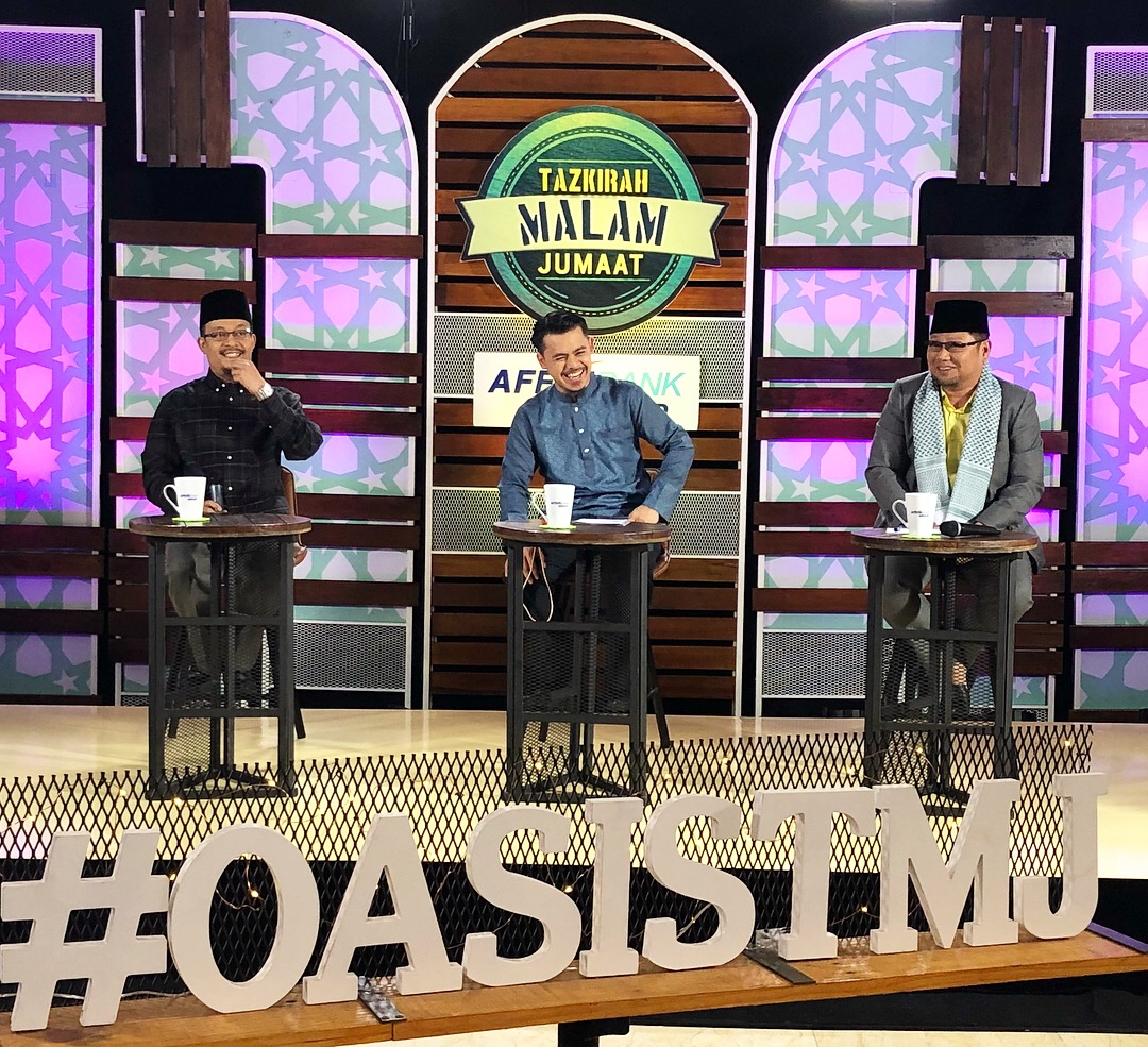 Rakaman Tazkirah Malam Jumaat